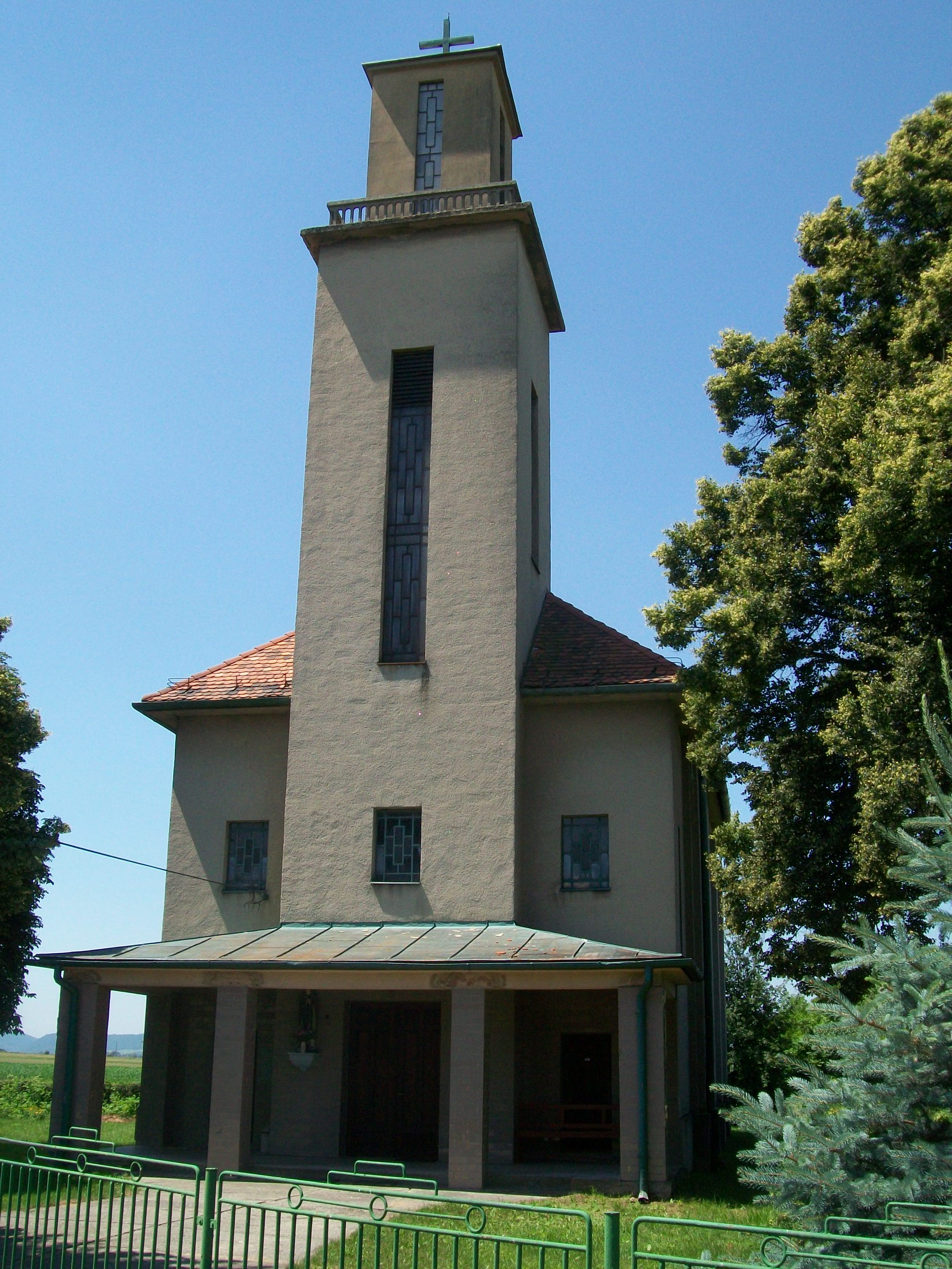 Rímskokatolícky kostol svätého Imricha (v múroch kostola je umiestnený 500-ročný mramorový náhrobný kameň Györgya Kalonday, zakladateľa obce)